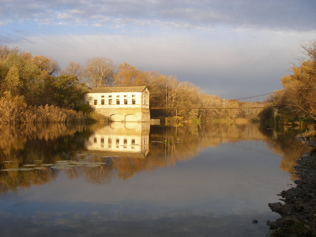 Перегонівська ГЕС